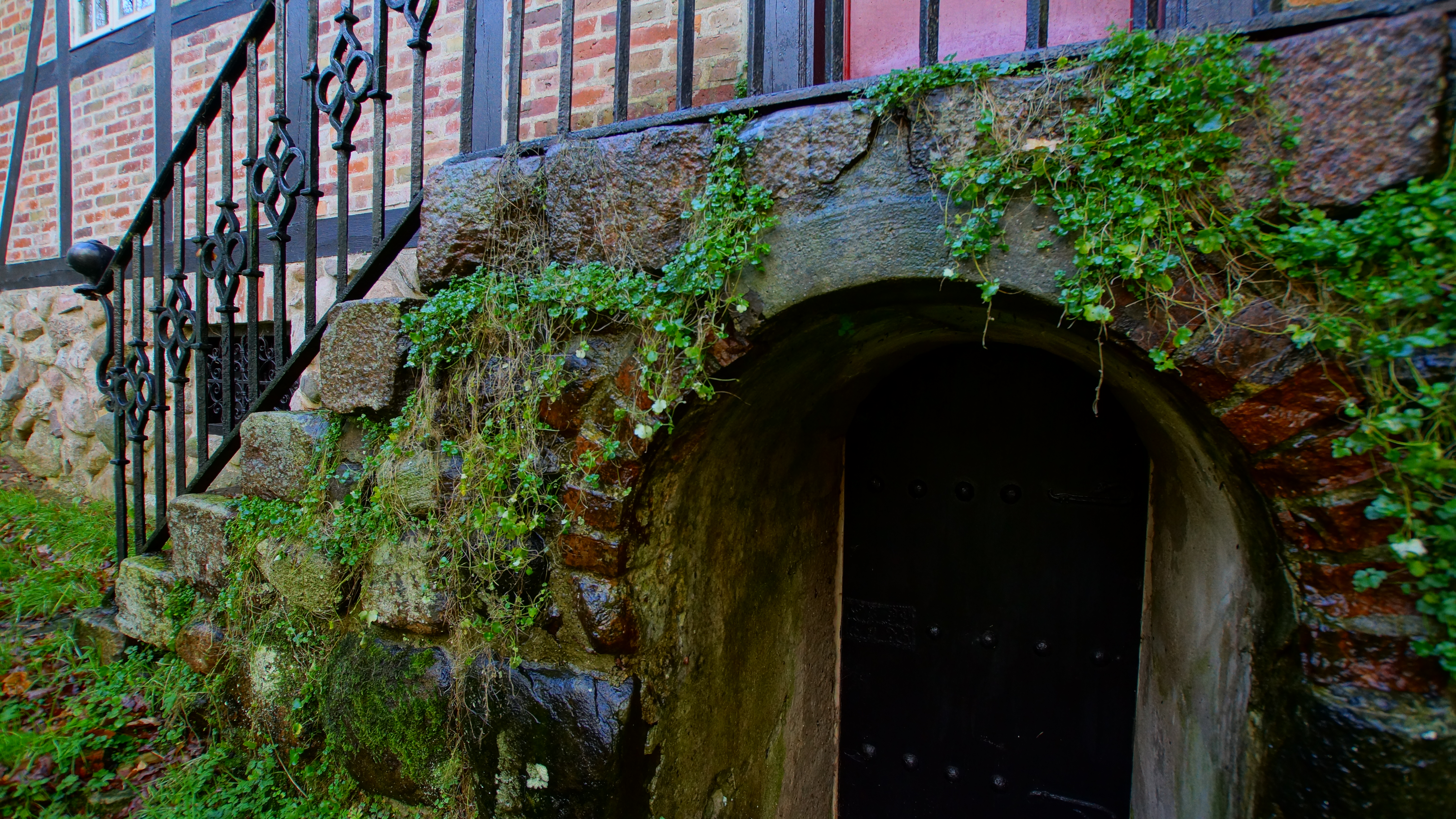 Egil Fischer Sommerhus 3